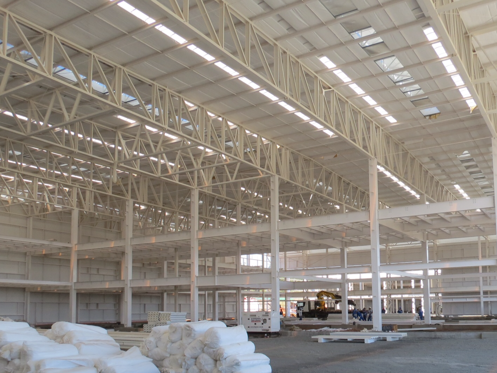 Projeto 32 - Fotos internas do sistema de ventilação e iluminação natural, Set 2014. Obra do novo B Mnt Sup Av Ex.